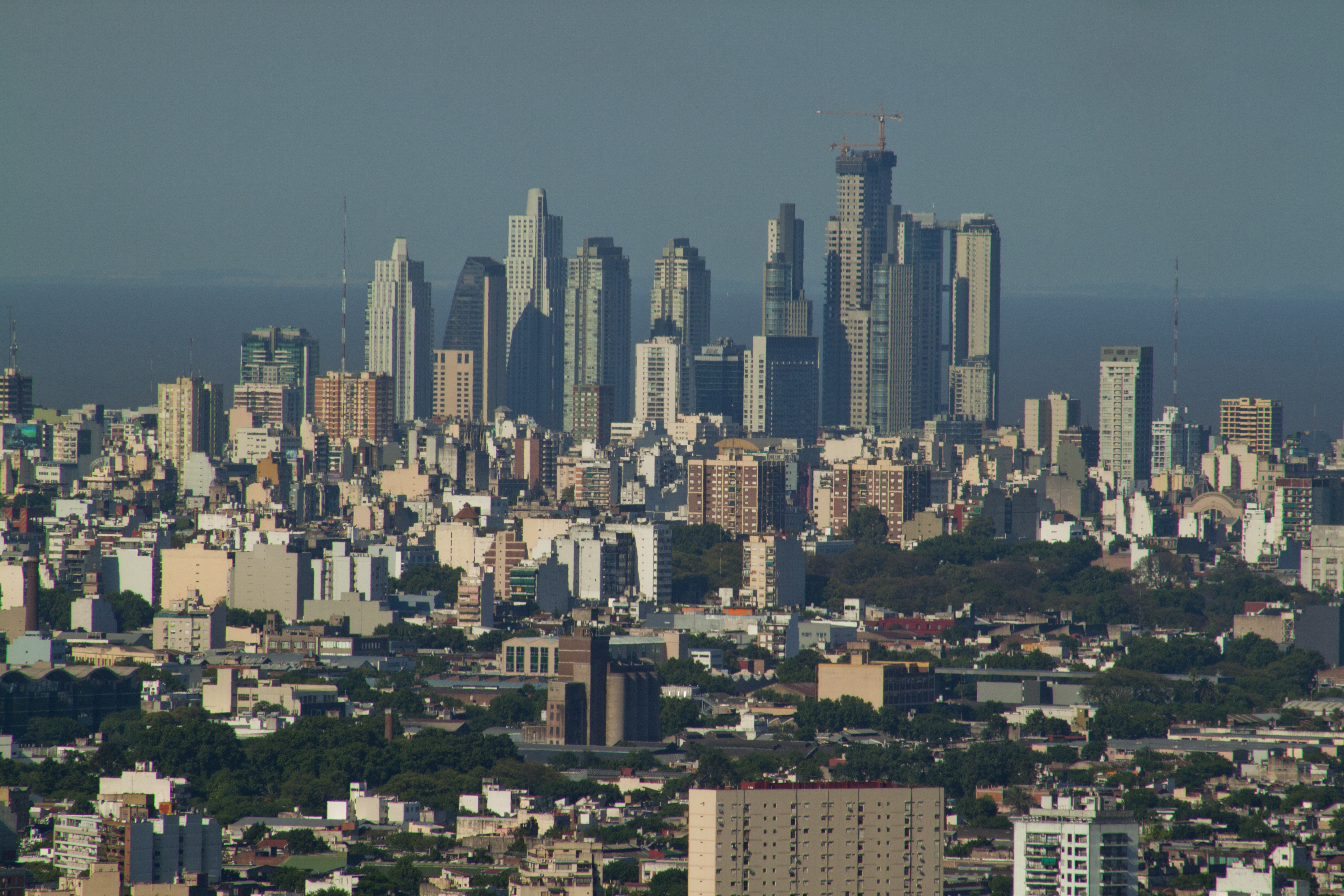 La ciudad de Buenos Aires desde la Torre Espacial, se destacan las torres de Puerto Madero.Sitio: Torre Espacial